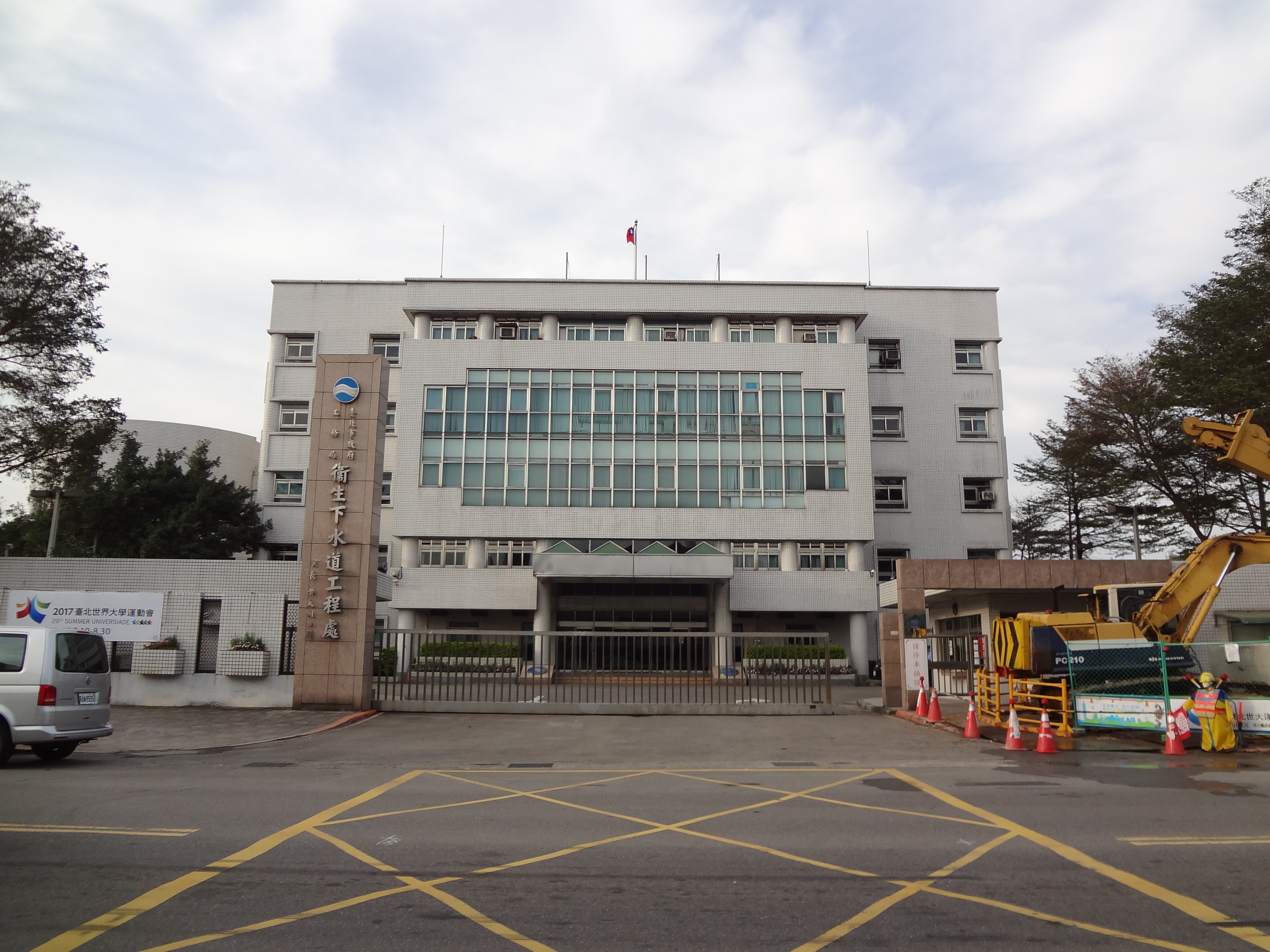 中文（台灣）: 臺北市政府工務局衛生下水道工程處，地址：臺北市大同區酒泉街235號。